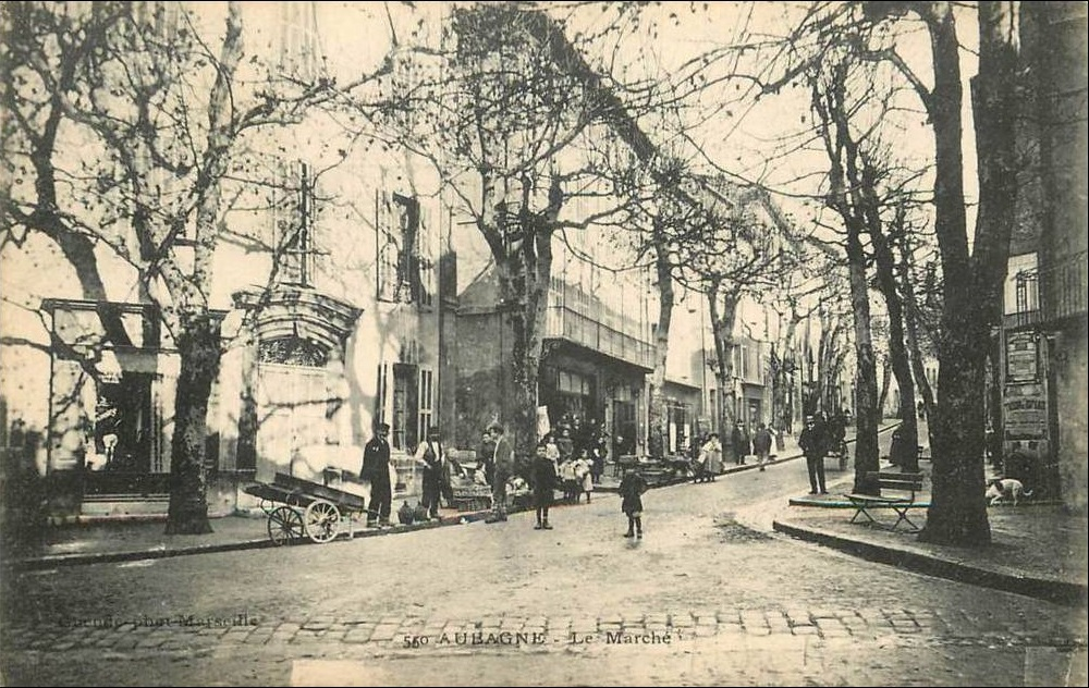 Aubagne le marché